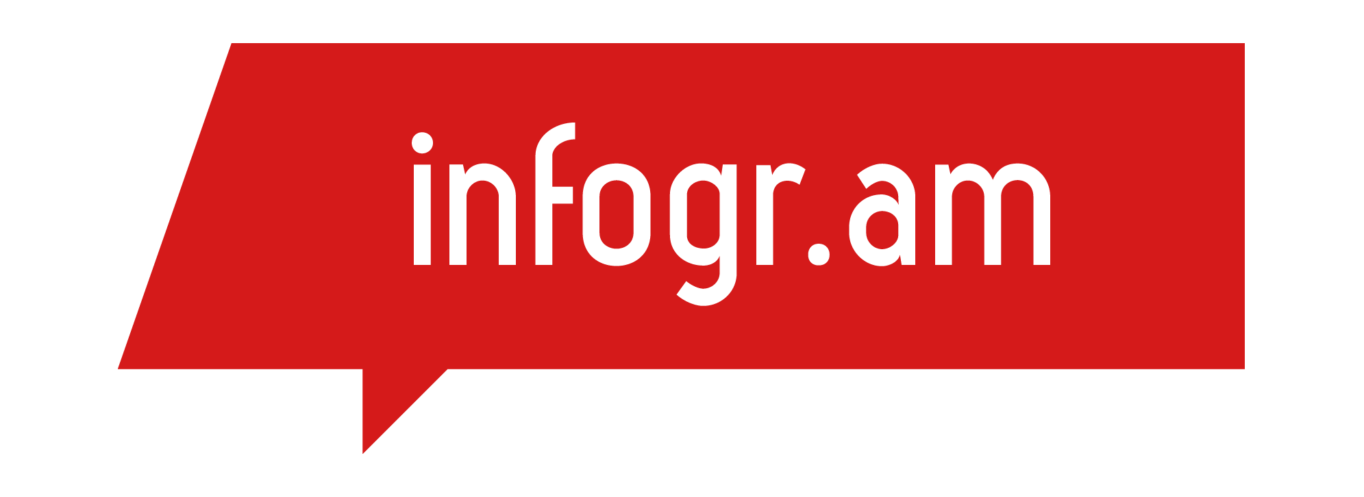 Logo d'Infogram